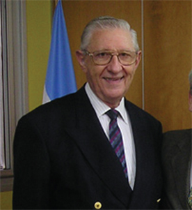 Foto de un ingeniero de la Universidad Nacional del Litoral